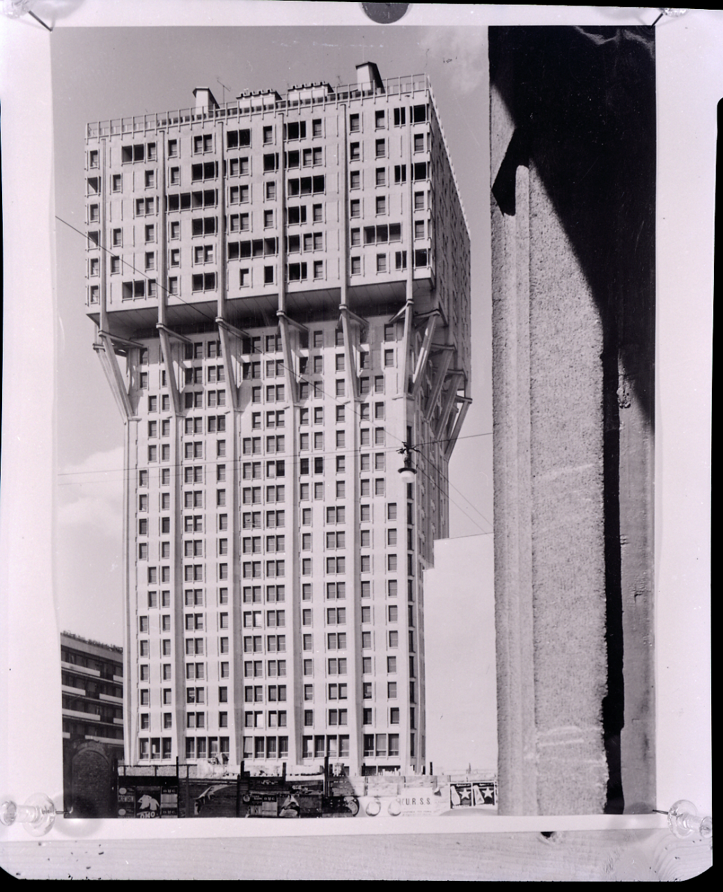 Servizio fotografico : Milano, 1973 / Paolo Monti. - Buste: 1, Fototipi: 2 : Negativo b/n, gelatina bromuro d'argento/ pellicola ; 10x12. - ((Serie costituita da 2 negativi senza numerazione. La suddetta serie è contenuta nella scatola identificata con la numerazione SN02G; sul coperchio iscrizione manoscritta a pennarello: "Arch. Scarpa 1"